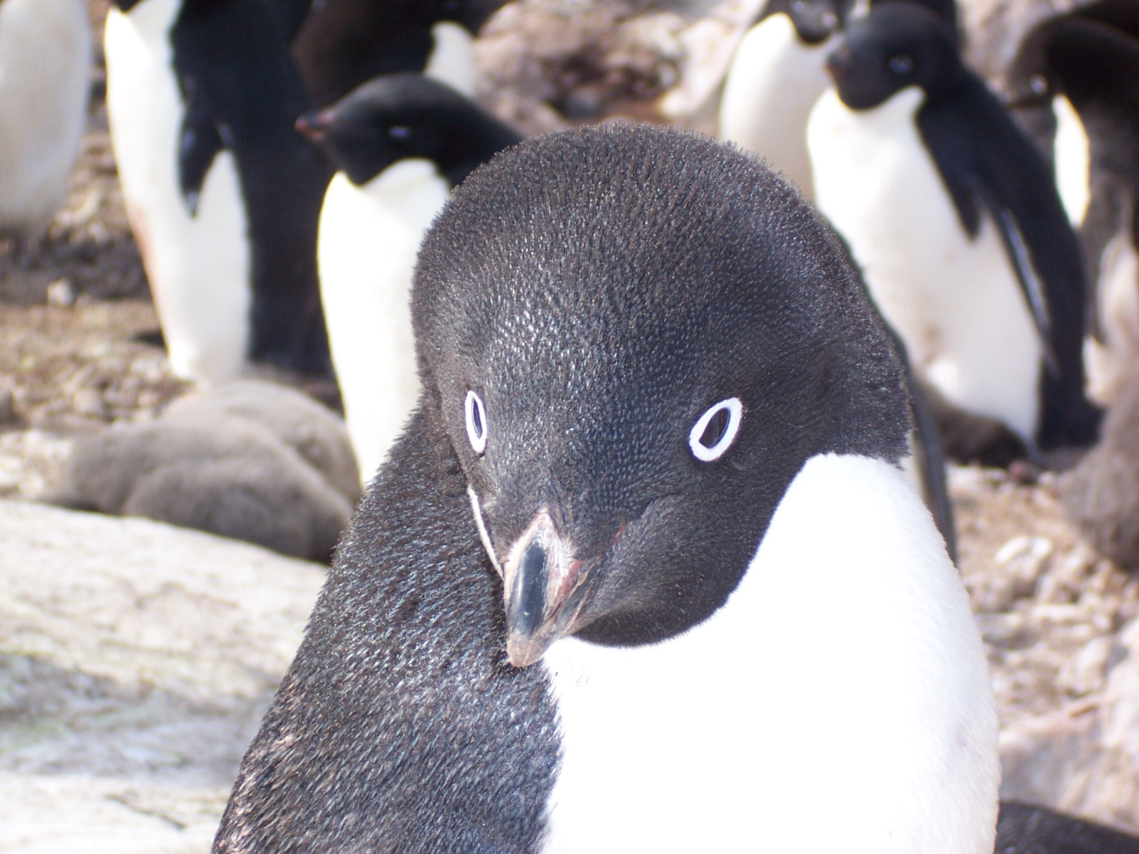 Détail de la tête d'un manchot Adélie